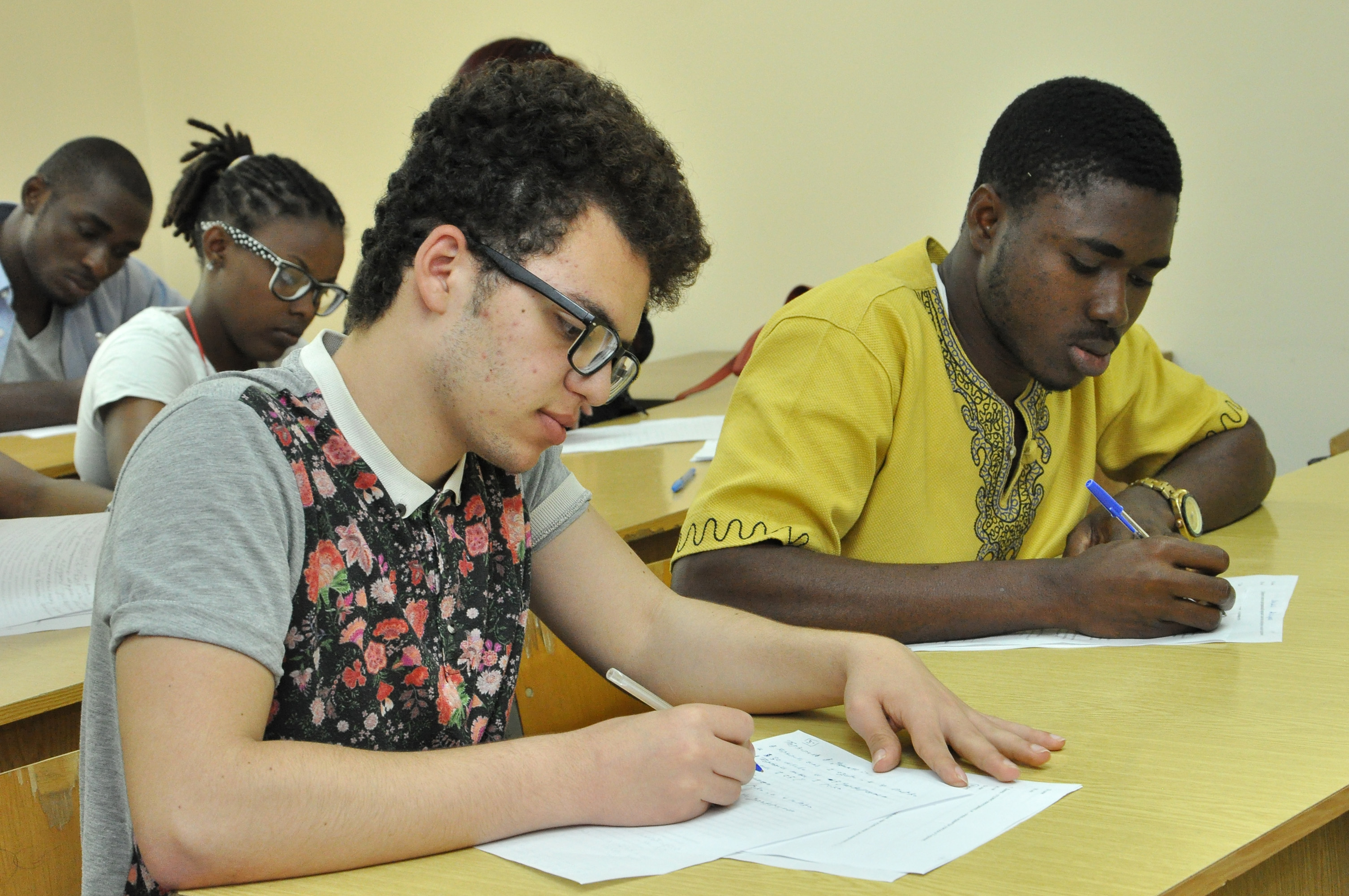 Вручення дипломів слухачам підготовчого відділення для іноземців та осіб без громадянства Тернопільського державного медичного університету імені І. Я. Горбачевського. На іспиті Абоузеід Кхалід і Ассіліджое Максвелл.